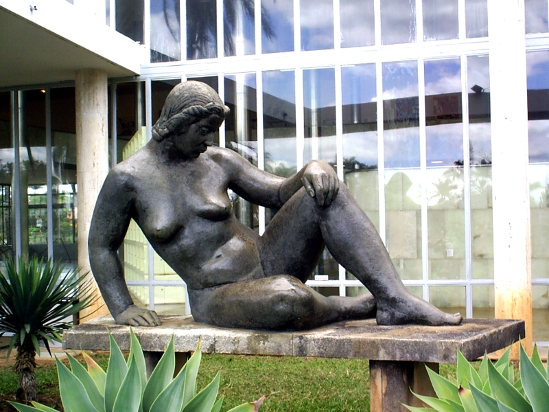 "Nu", escultura de August Zamoyski, Museu de Arte da Pampulha, Belo Horizonte